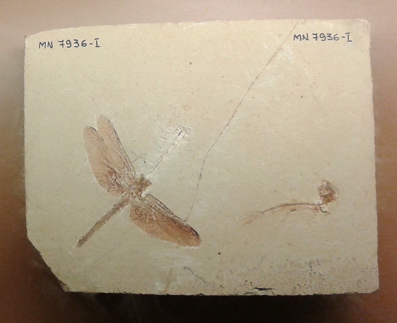 Português do Brasil: Odonata (libélula). Acervo do Museu Nacional/UFRJ, Rio de Janeiro, Brasil.